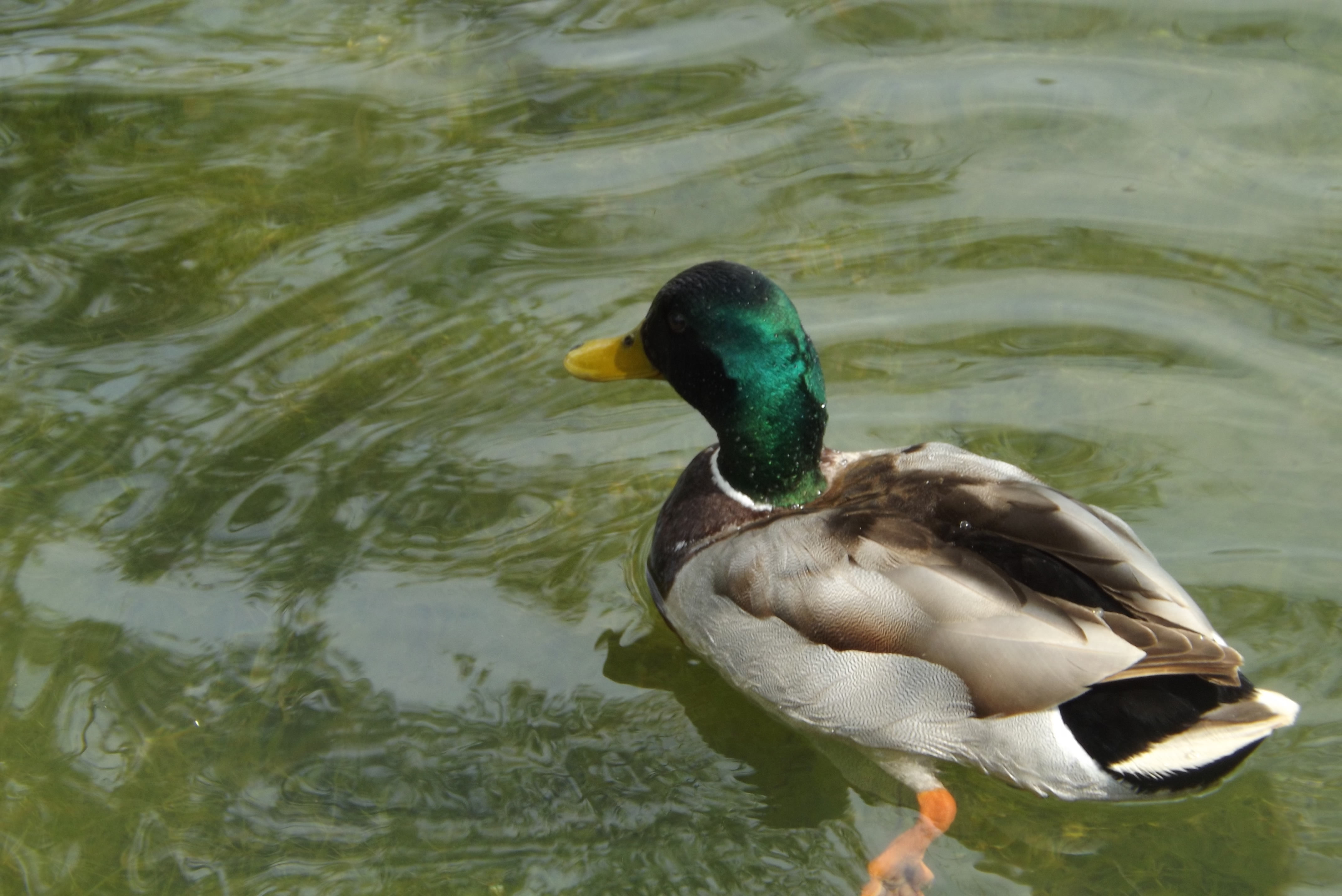 Kacsa a Békás-tavon, debreceni Nagyerdő